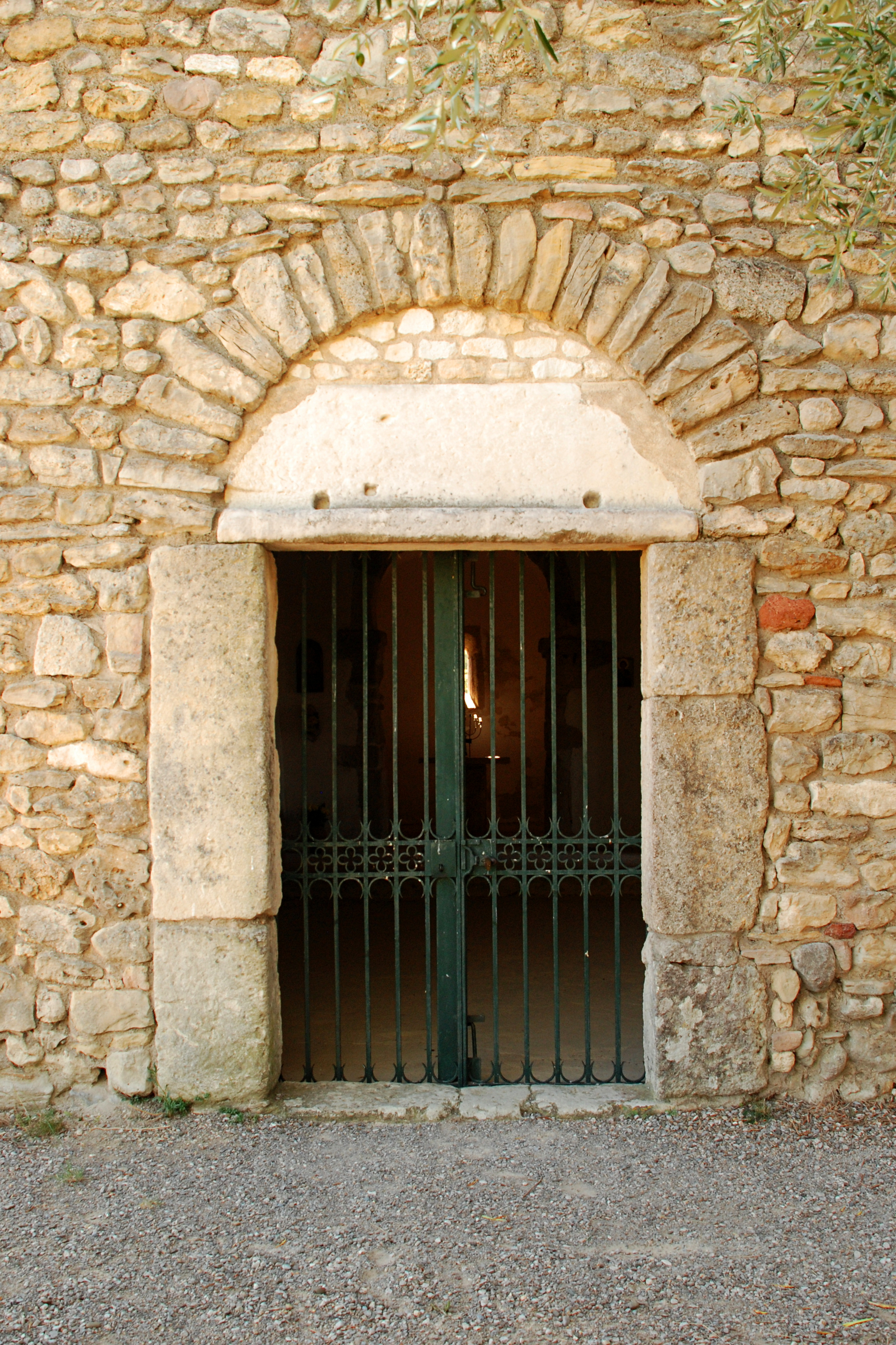 France - Languedoc - Aude - Moussan - chapelle Saint-Laurent (préroman) .